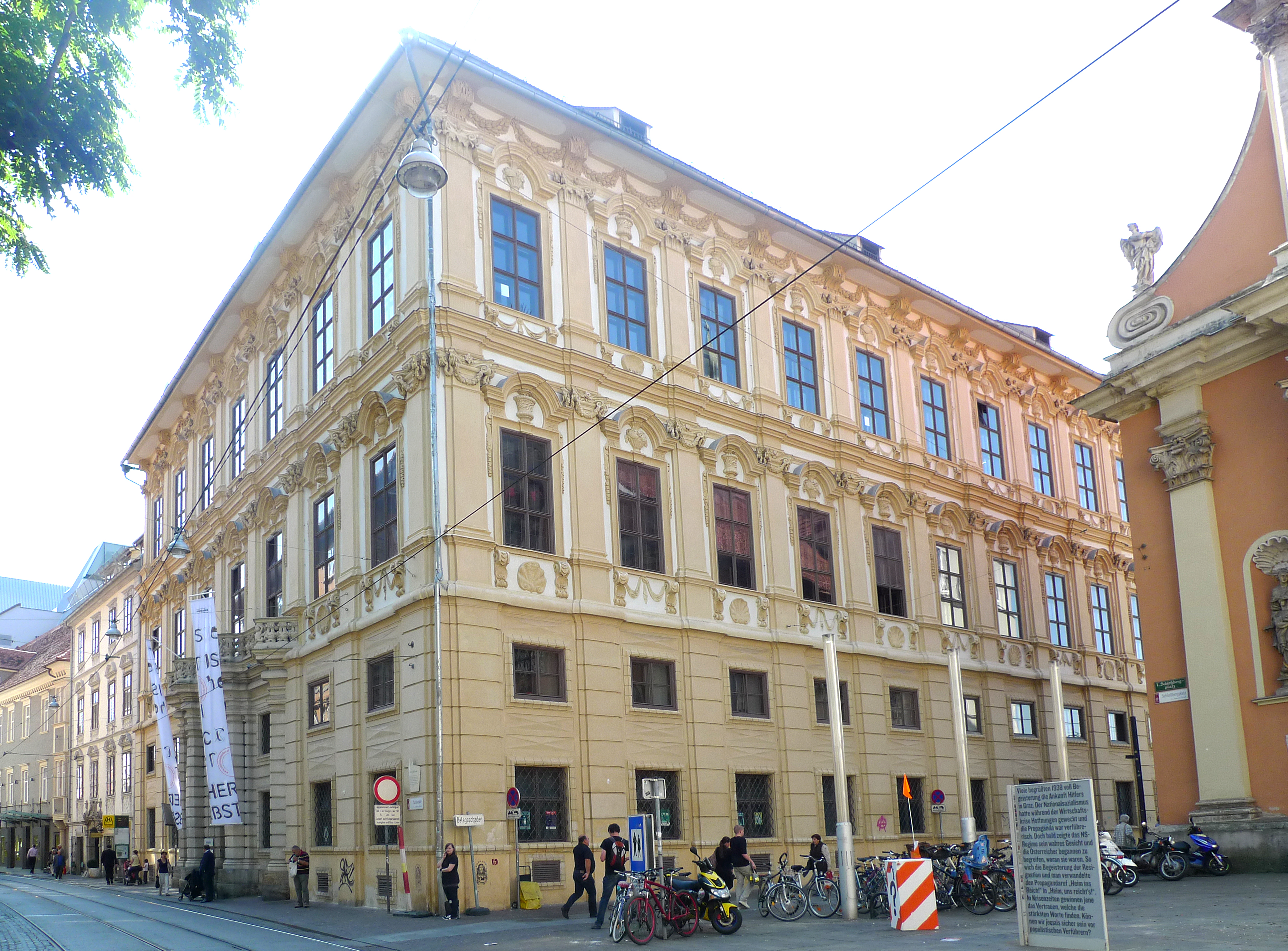 Ehem. Palais Attems